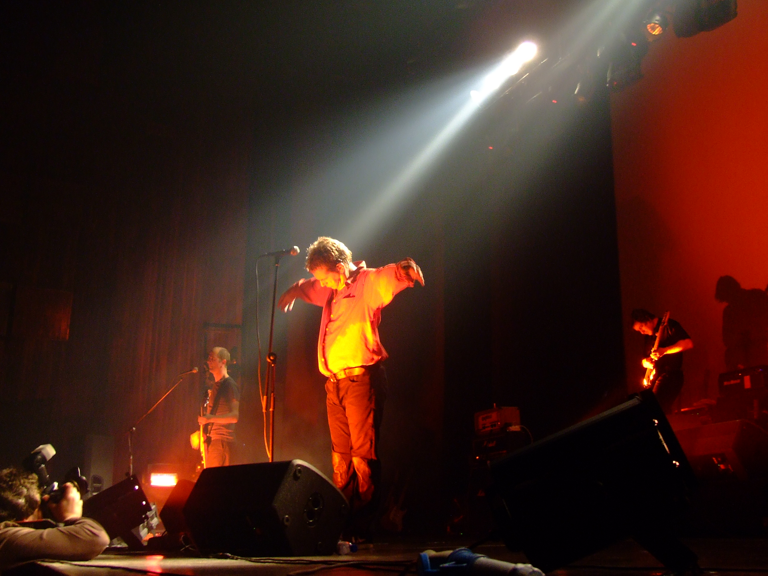 Mão Morta no SÃO MAMEDE Centro de Artes e Espectáculos de Guimarães.